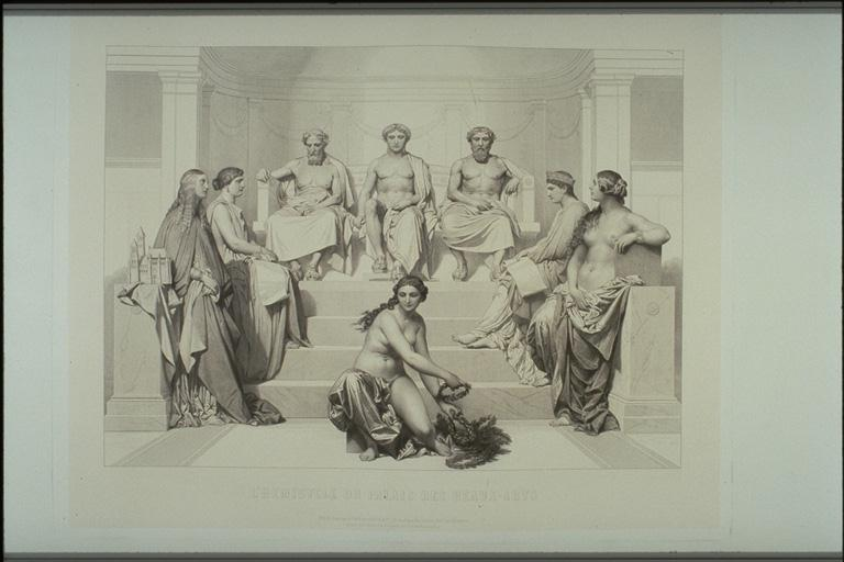 Central panel of "L'Hémicycle des Beaux-arts" by Louis-Pierre Henriquel-Dupont after Paul Delaroche (1797-1856). Copperplate.